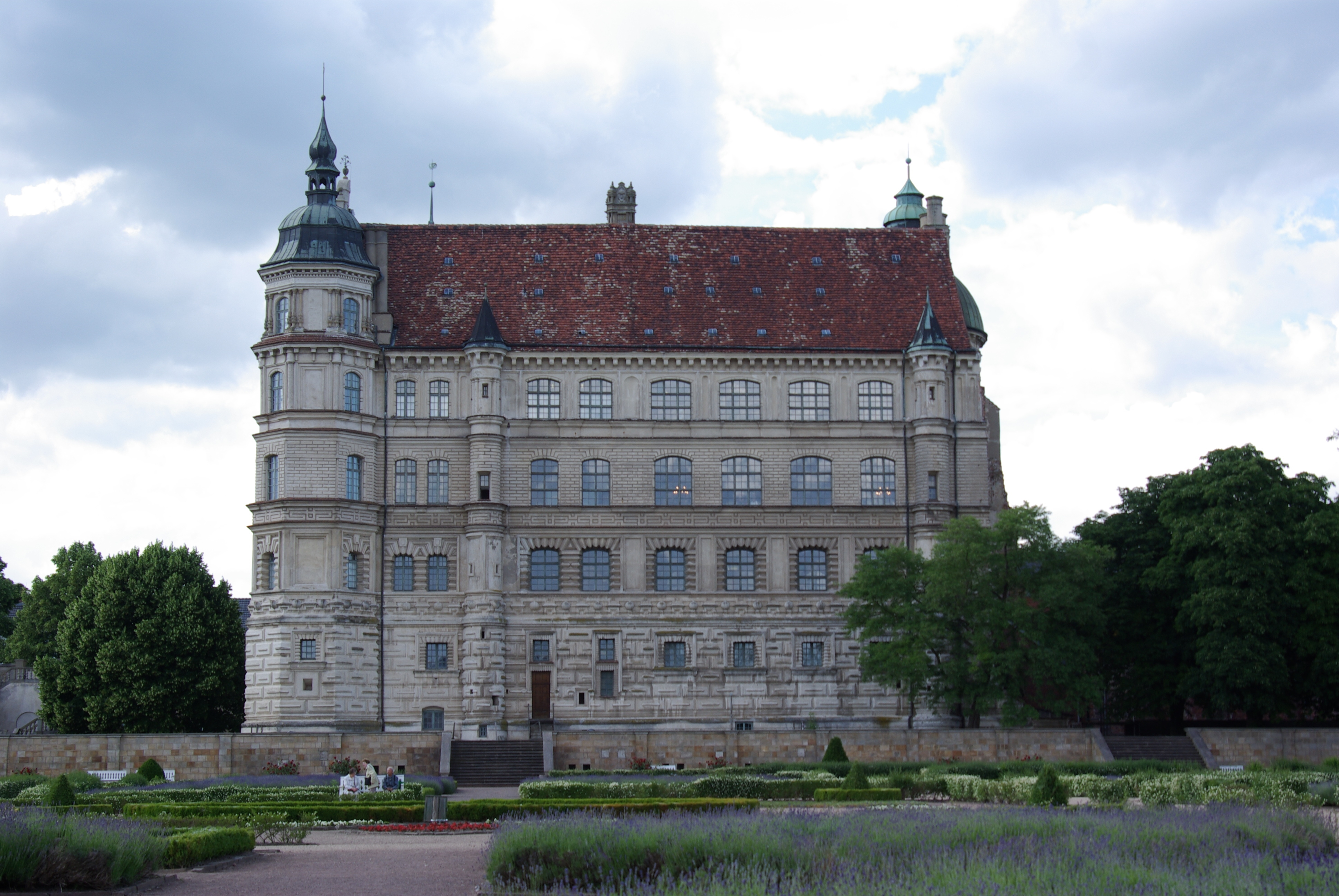 Güstrow in Mecklenburg-Vorpommern. Das Schloß vom Park aus.